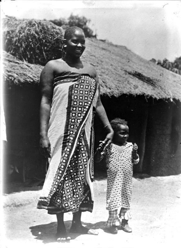 Suahelifrau mit Kind